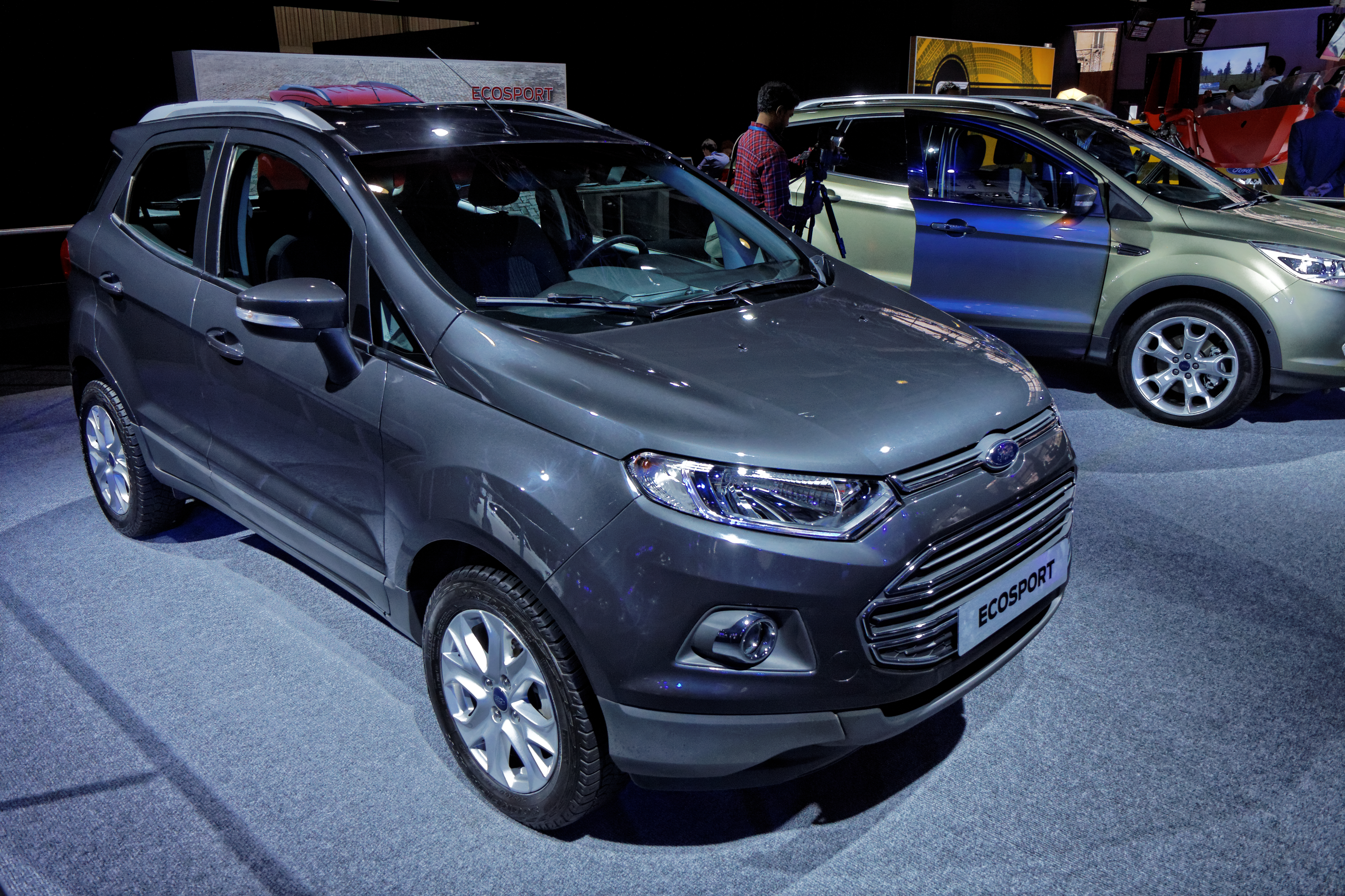 La Ford Ecosport présentée lors du Mondial de l'Automobile de Paris 2012.